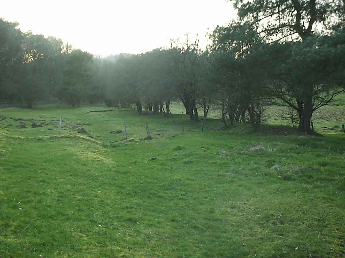 Die Trasse zwischen Hassel (Saar) und Hasseler Tunnel in Rtg. St. Ingbert ist durch die Reihe der Weißdornbüsche rechts deutlich markiert.